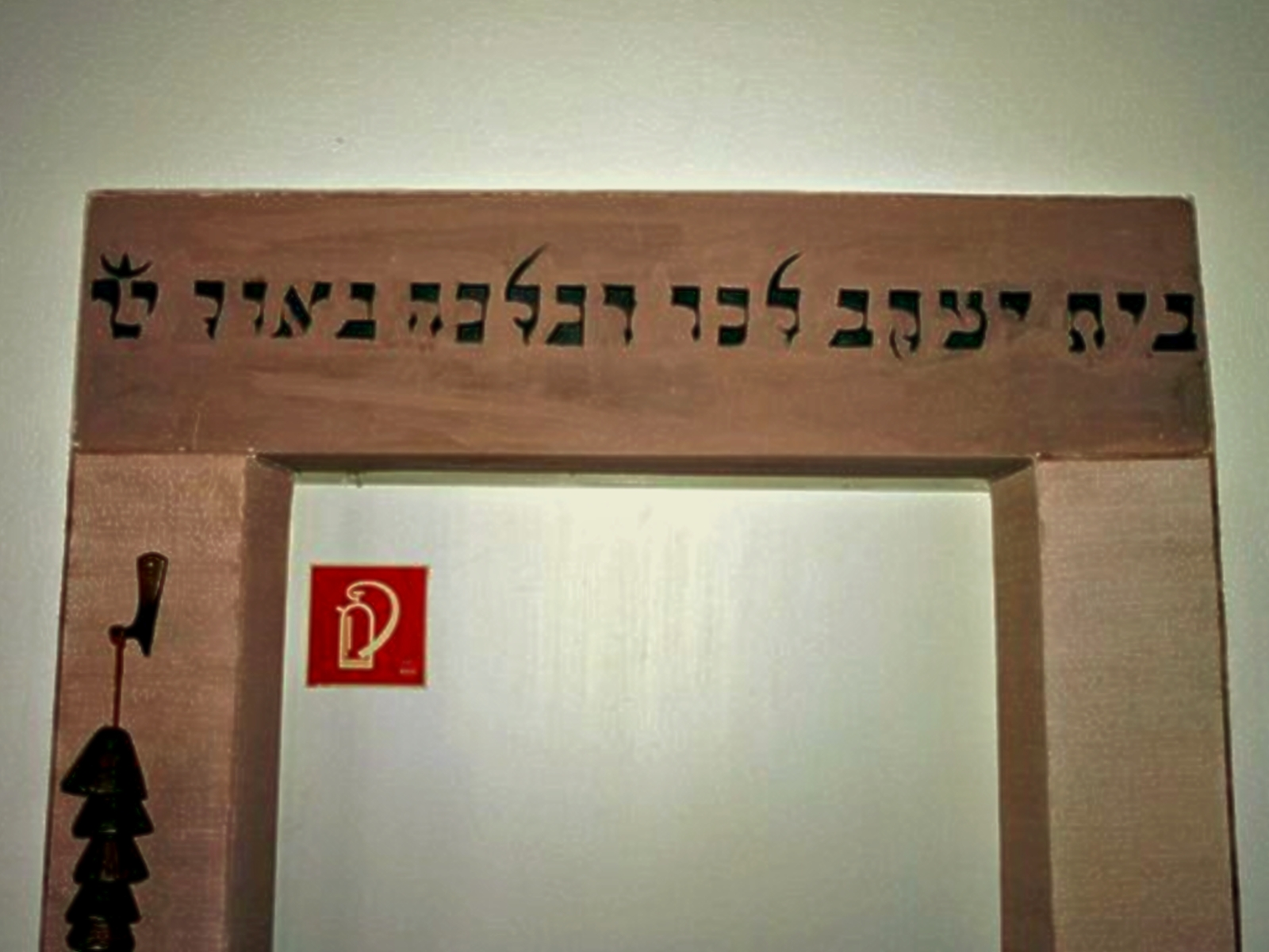 Türsturz aus der ehem. Synagoge Sachsenhausen (Stadt Waldeck)